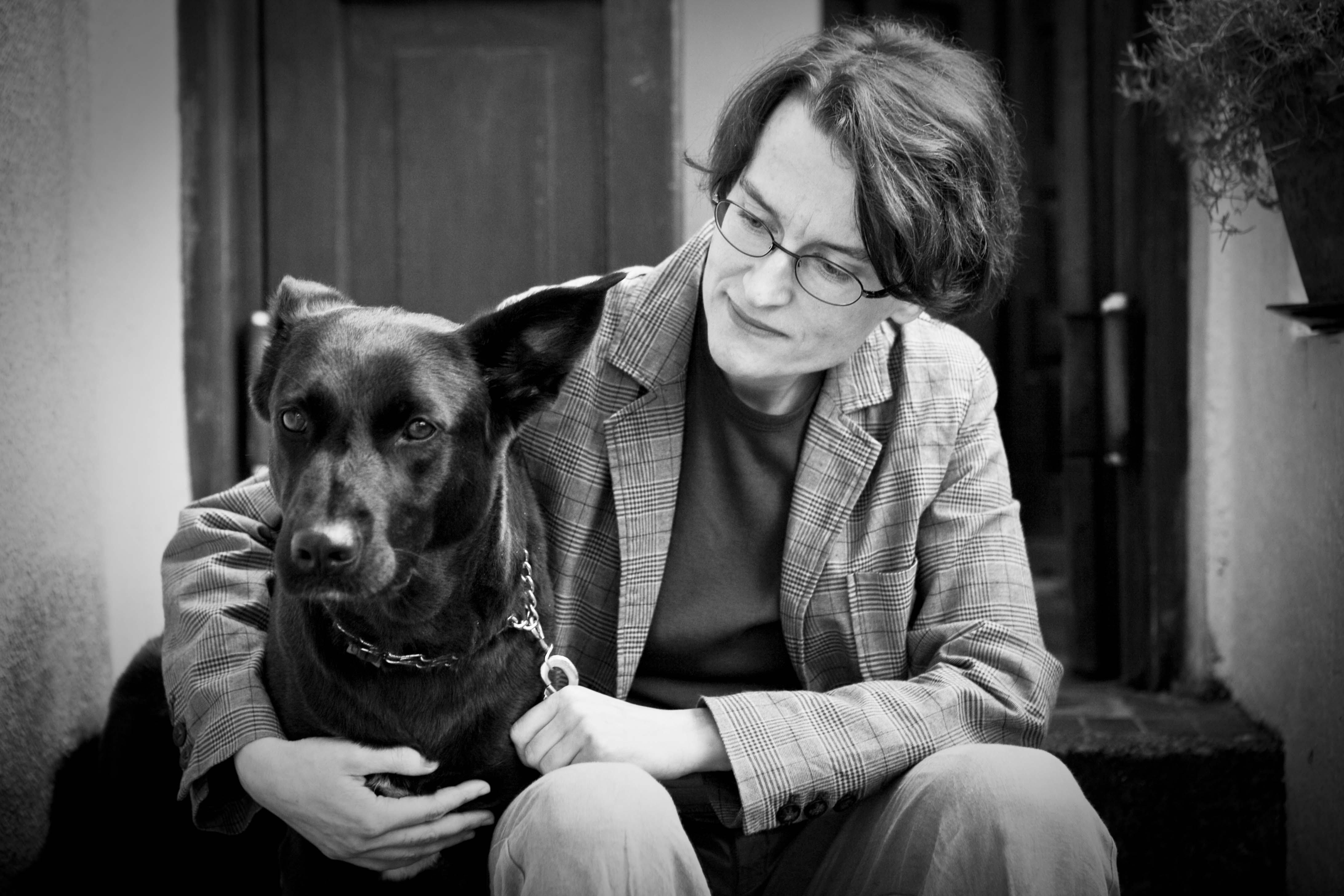 zdjęcie Gabrieli Kurylewicz